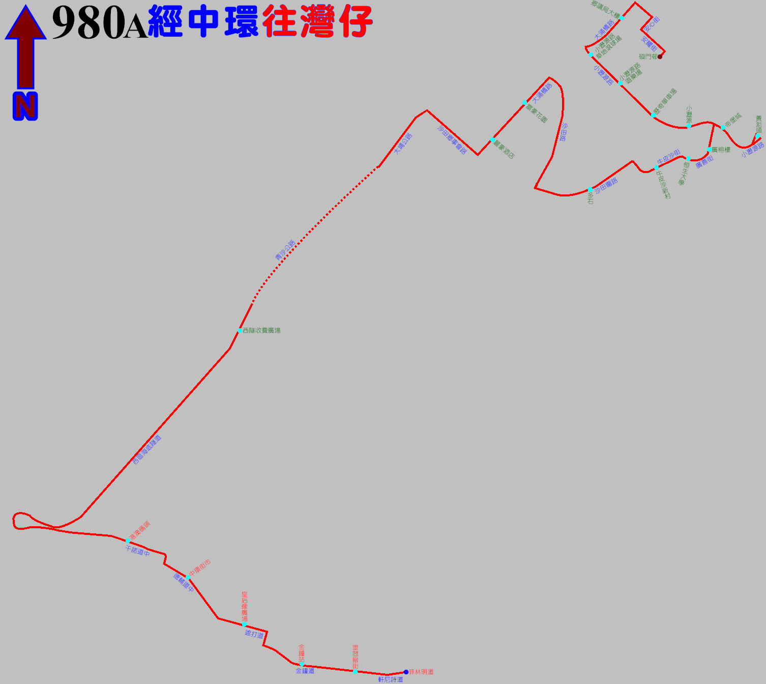 過海隧巴980A線的走線圖